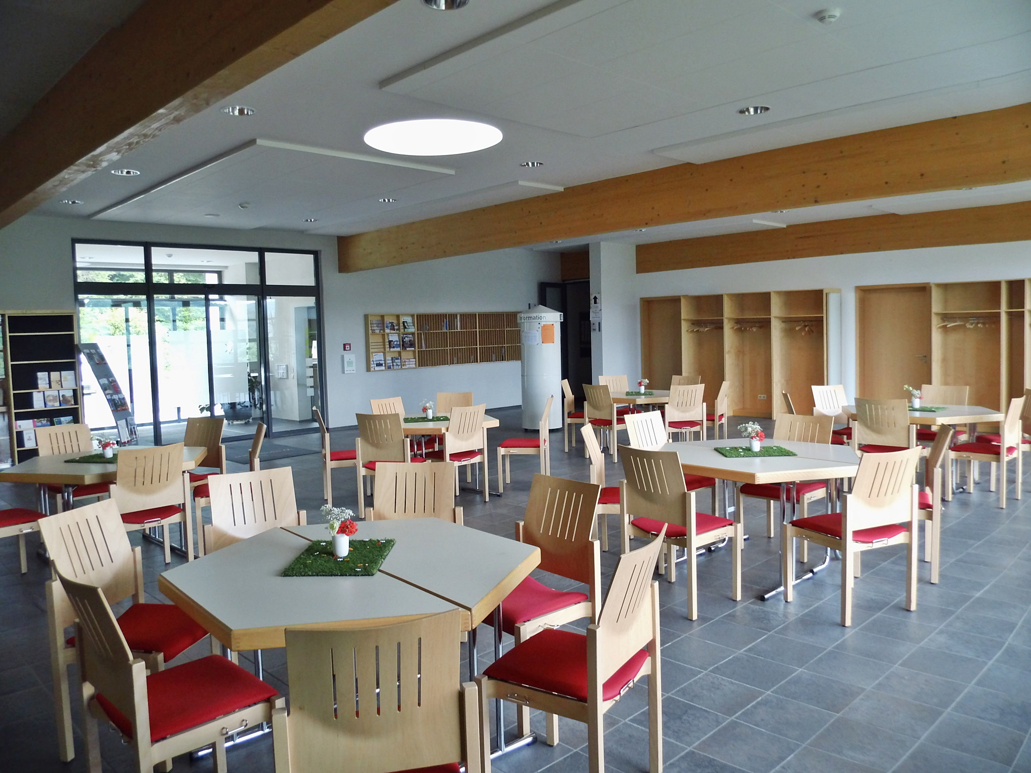 Foyer der baptistischen Christuskirche in Heiligenstadt in Oberfranken, Bayern, Deutschland